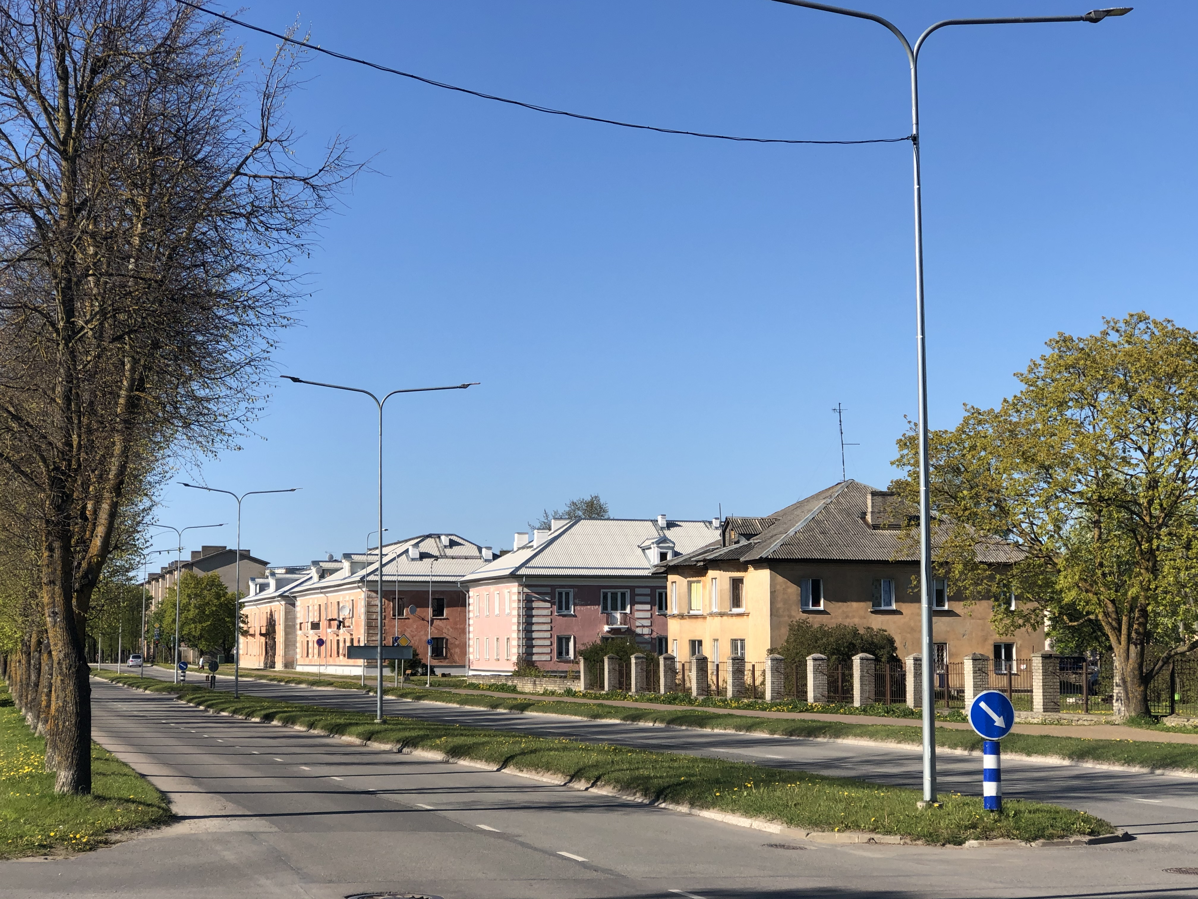 Улица Кренгольми в Нарве от перекрёстка с улицей Хайгла до перекрёстка с улицей Герасимова